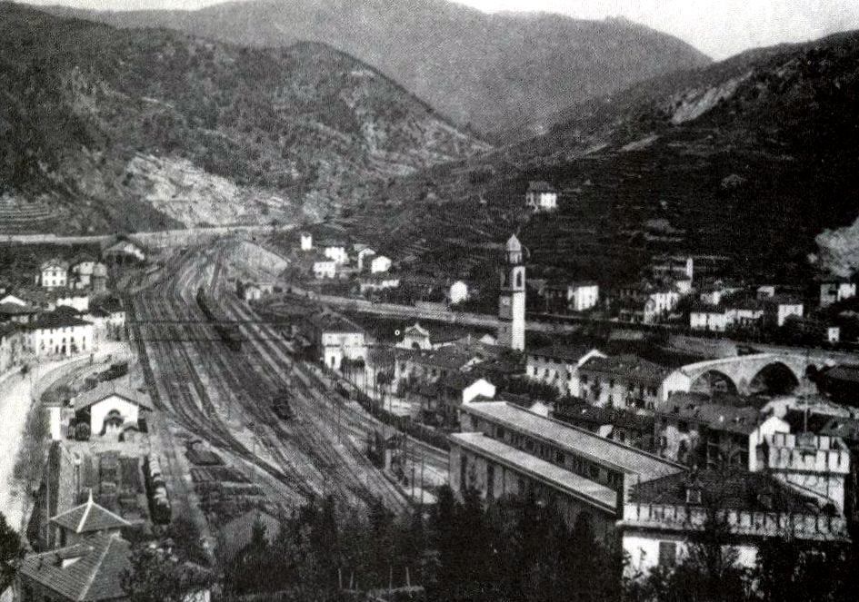 Panorama di inizio novecento della città e della linea ferroviaria presso Ronco Scrivia, Liguria, Italia